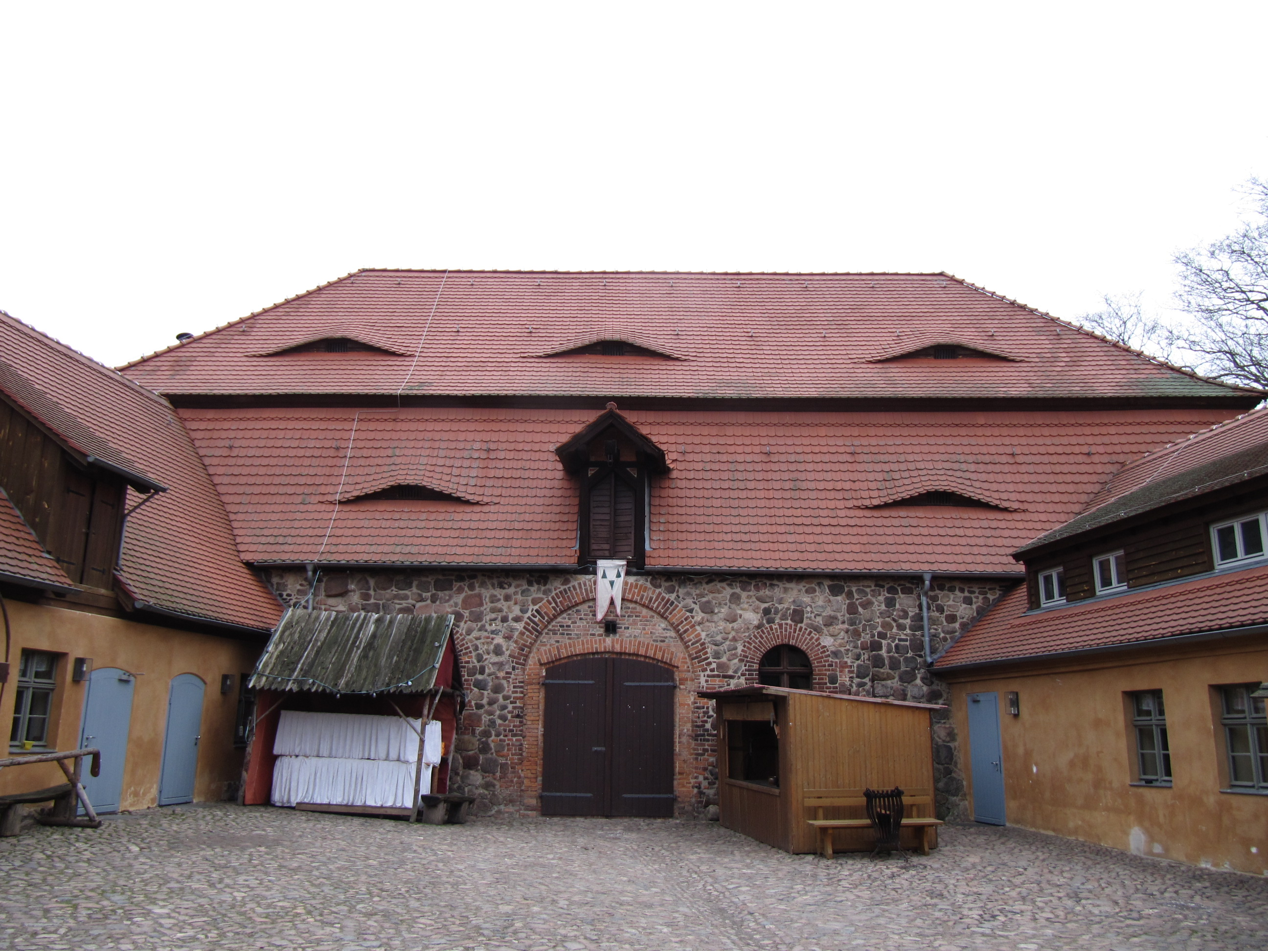 stall burg rabenstein